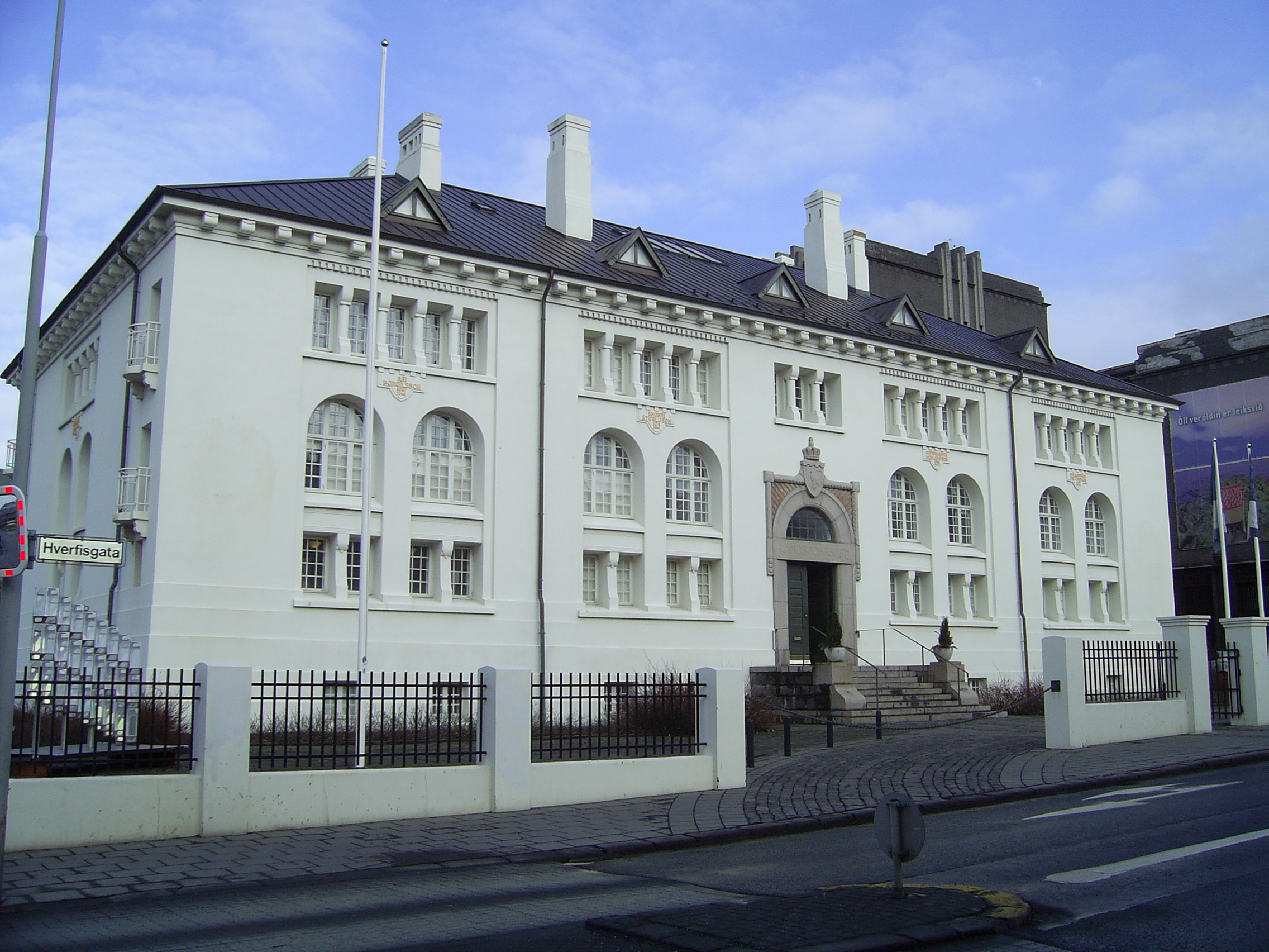 Þjóðmenningarhús, Reykjavík, Iceland.